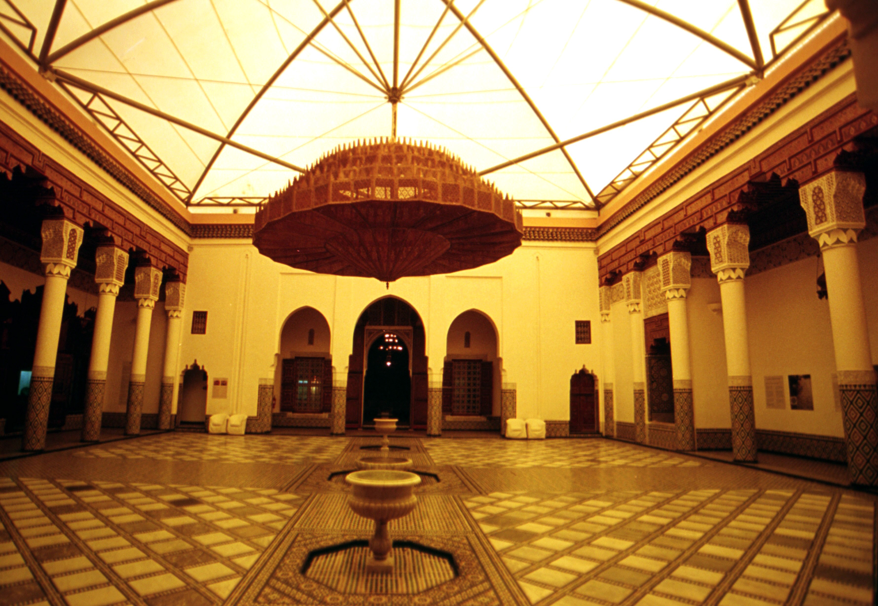 Patio intérieur du musée de Marrakech, situé près de la Médersa Ben Youssef, dans le quartier Mouessine